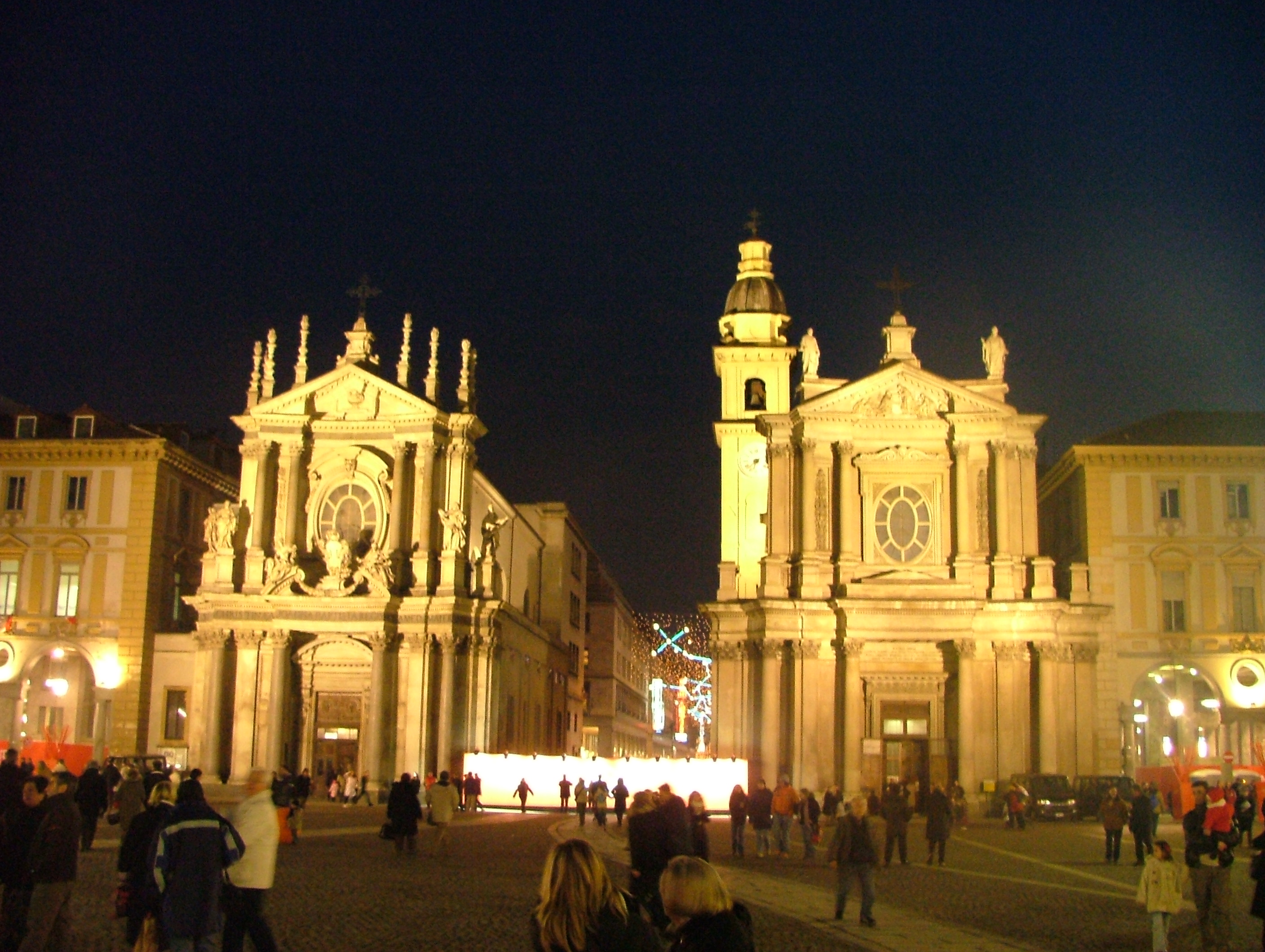 Torino, Italia